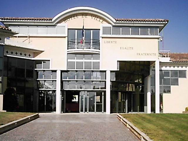 Hôtel de Ville du Puget-sur-Argens